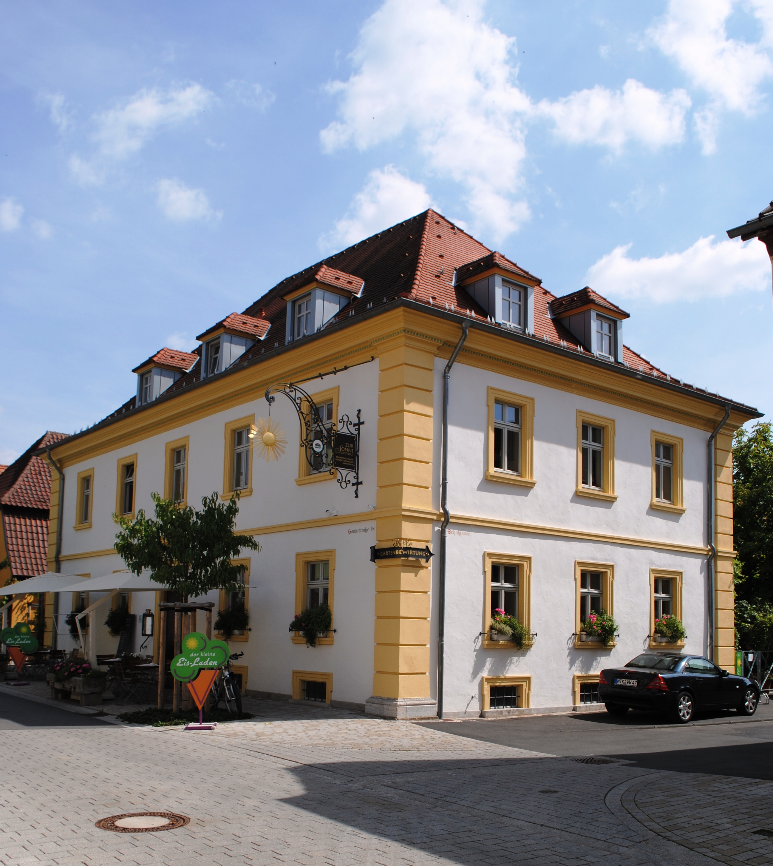 Gasthof, Hauptstraße 18, Nordheim am Main